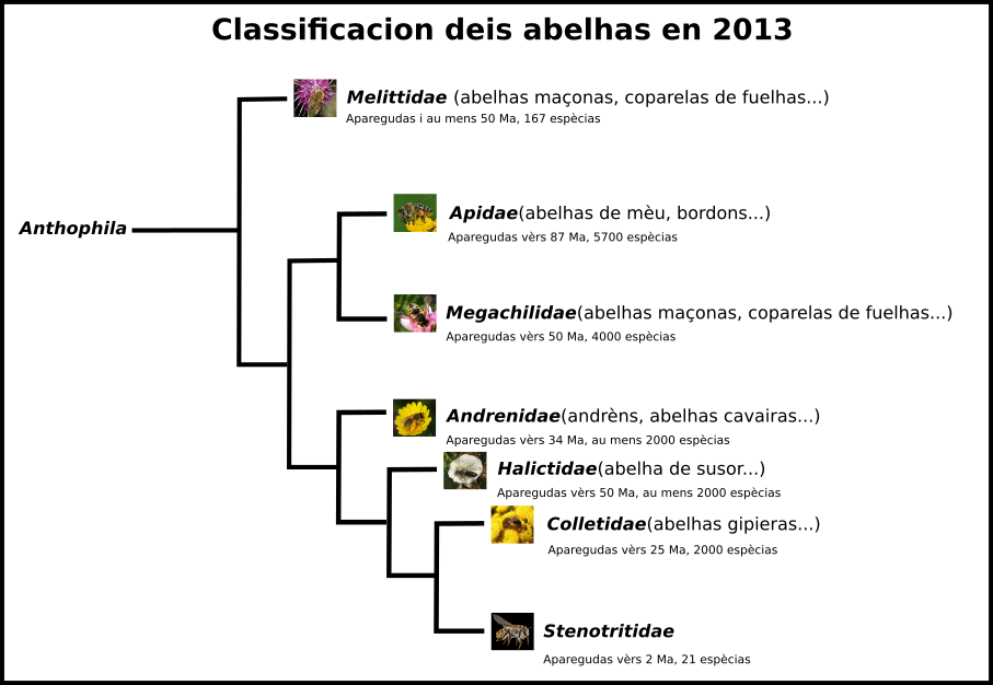 Classificacion deis abelhas en 2013.